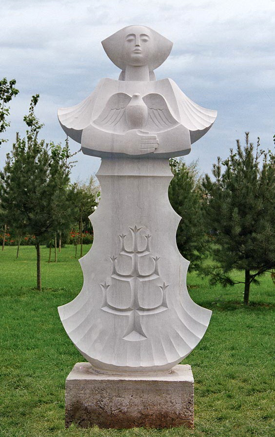 Եղիցի կյանք,Չինաստան, Պեկին